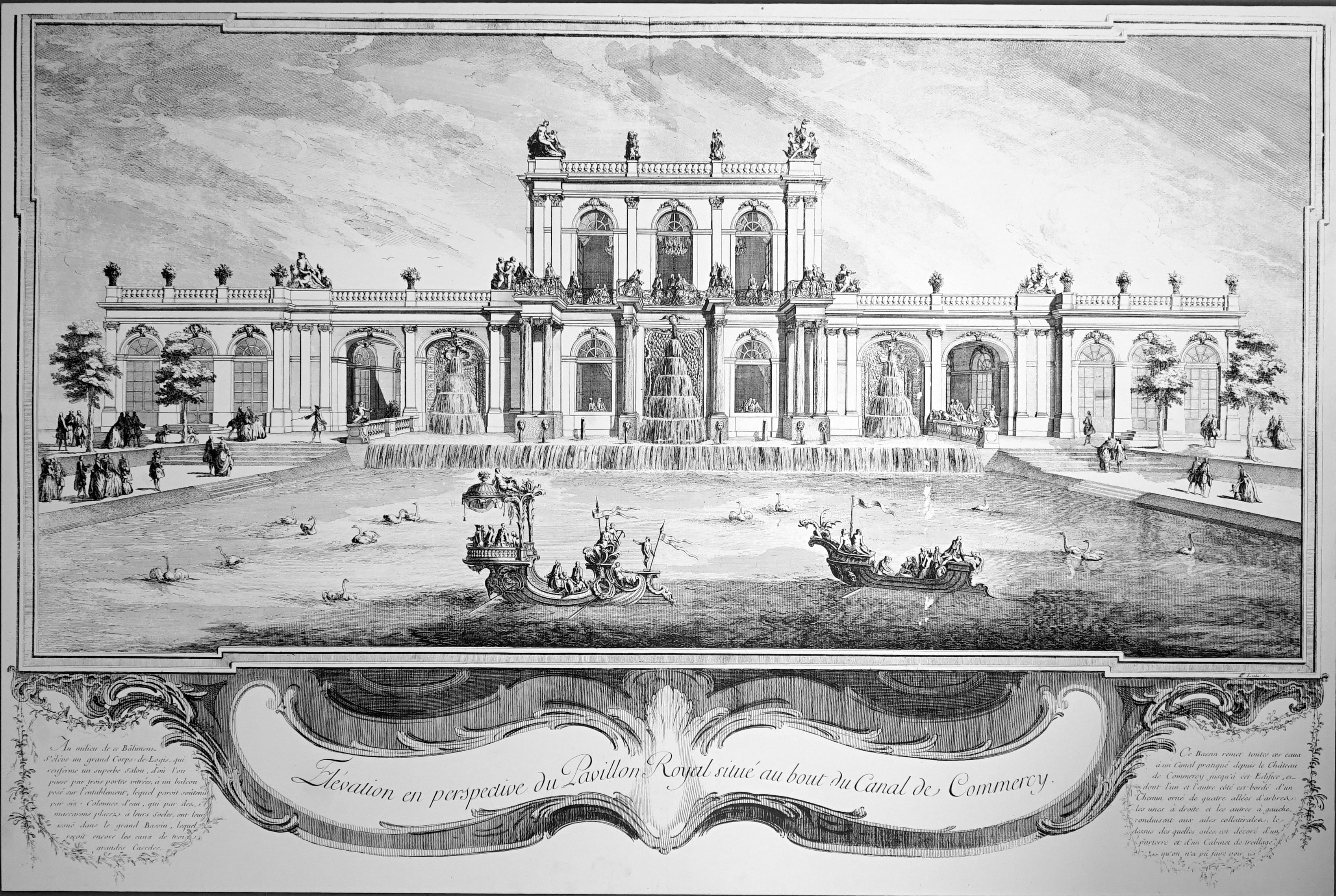 pavillon royal ayant disparu, dessin présenté au musée de COmmercy.